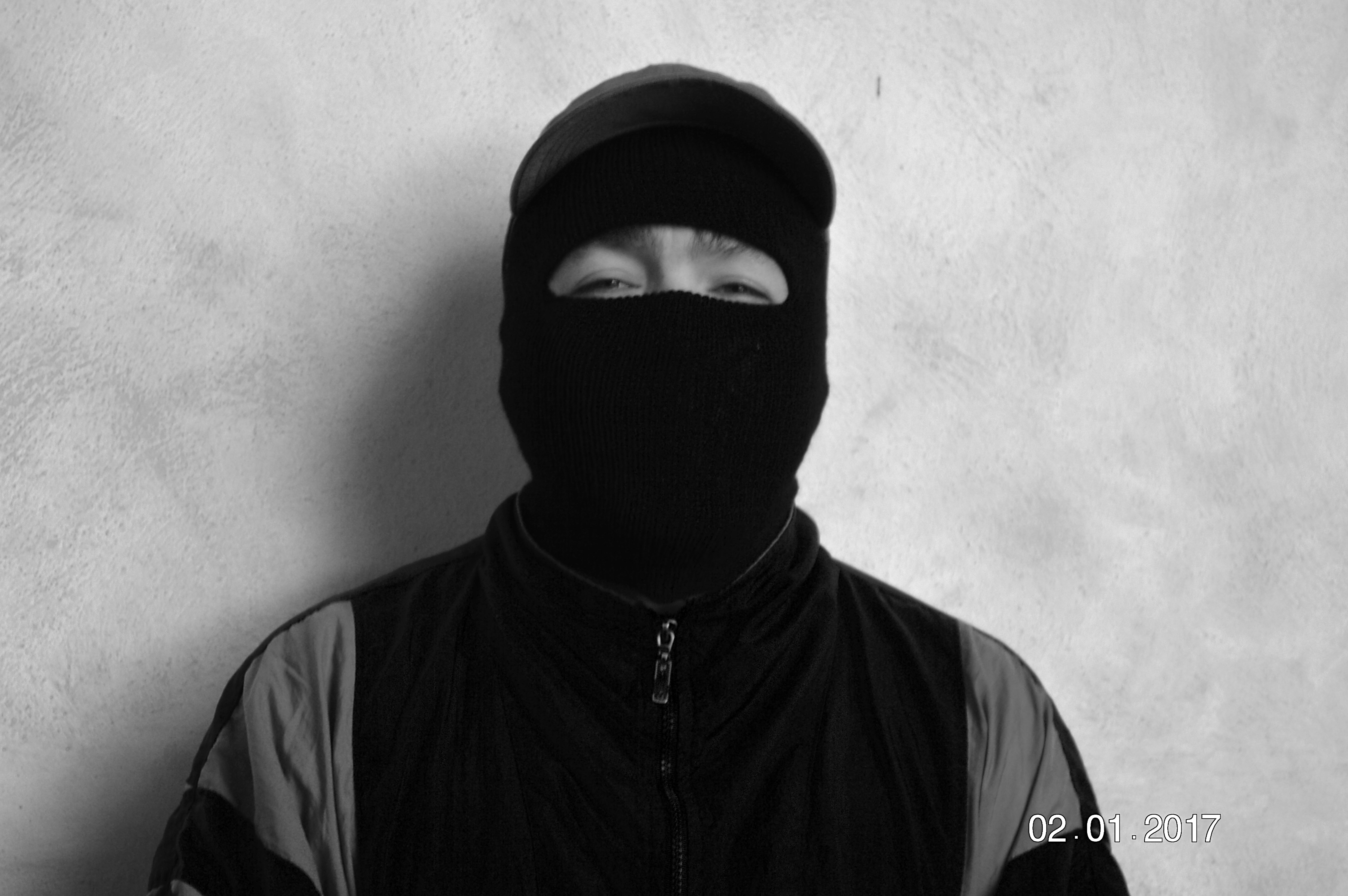 Impia malavita